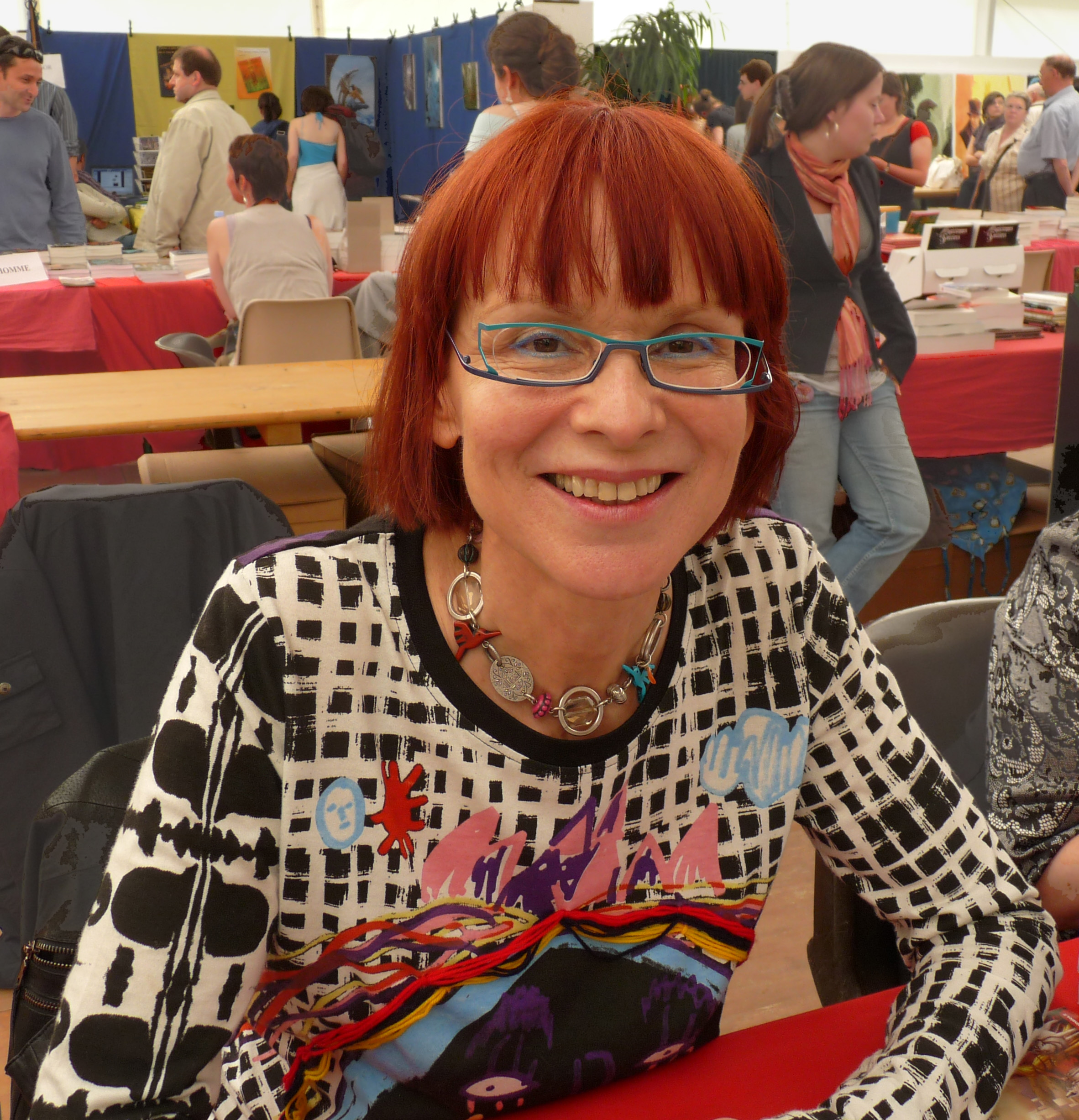 Joëlle Wintrebert (Imaginales 2010, Epinal)